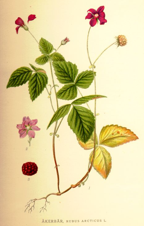 Åkerbär (Rubus arcticus L.)